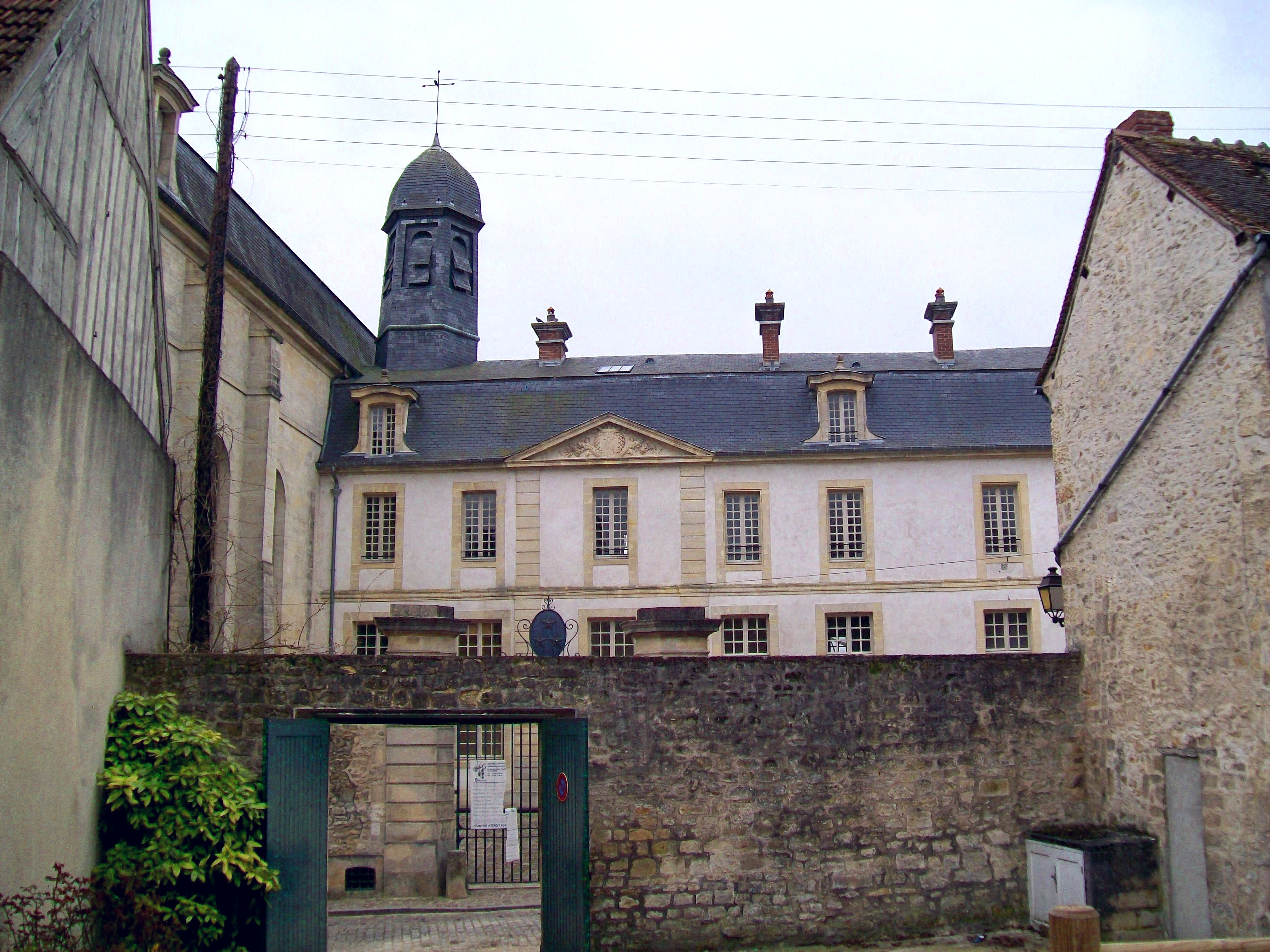 L'hôpital de la Charité vu depuis la cour de la demeure en face, rue de Beauvais. Cette aile a été utilisée comme école après la fermeture de l'hôpital.